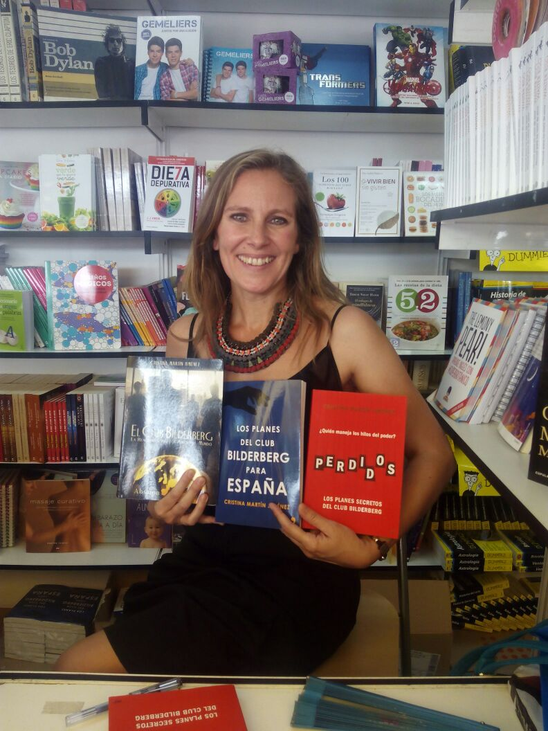 Cristina Martín Jiménez Feria del Libro de Madrid 2015